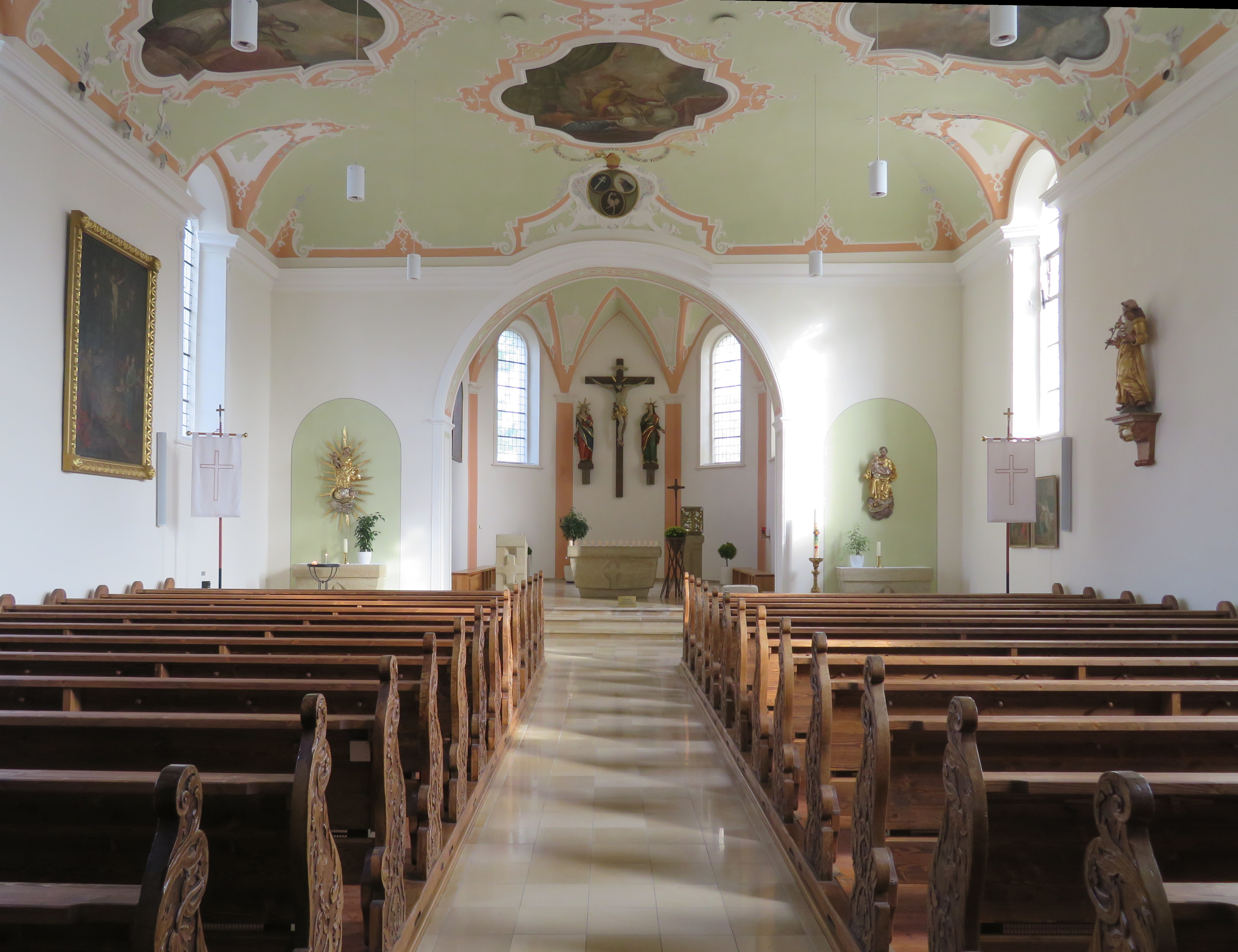 Kath. Pfarrkirche St. Martin Unterkirchberg